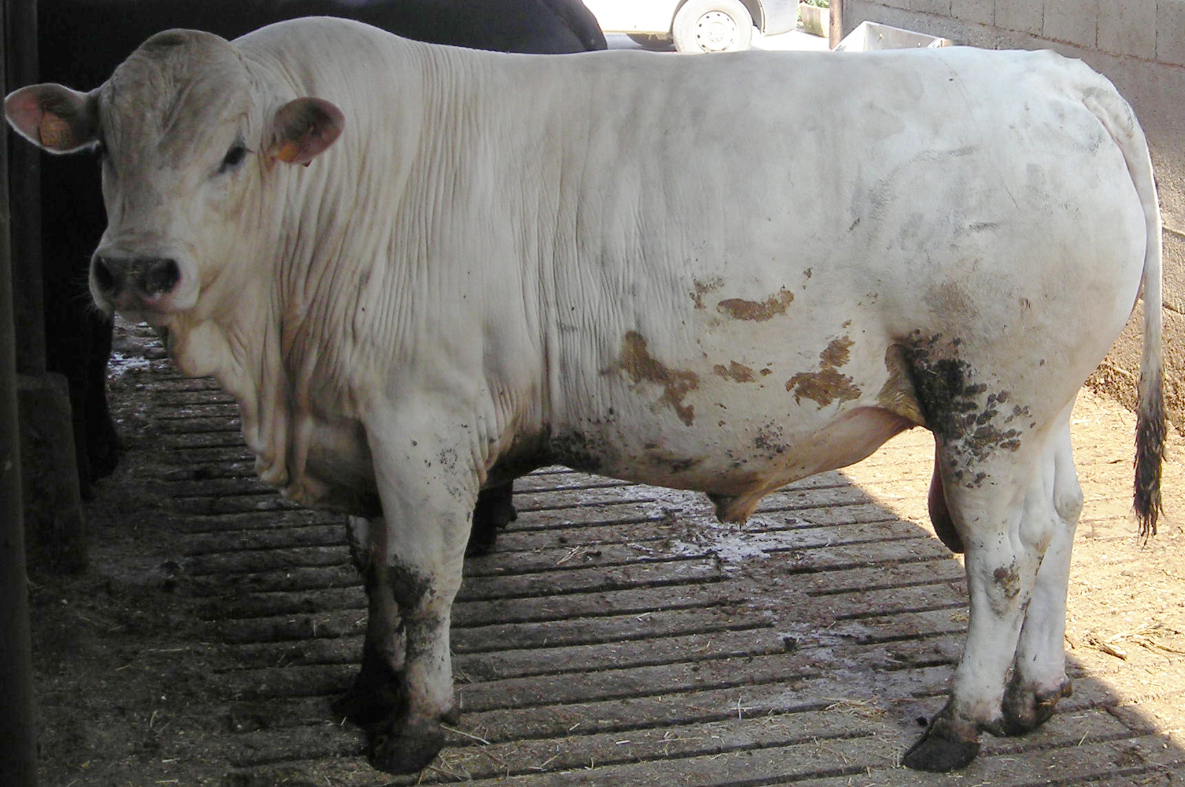 Toro di razza Bianca Val Padana